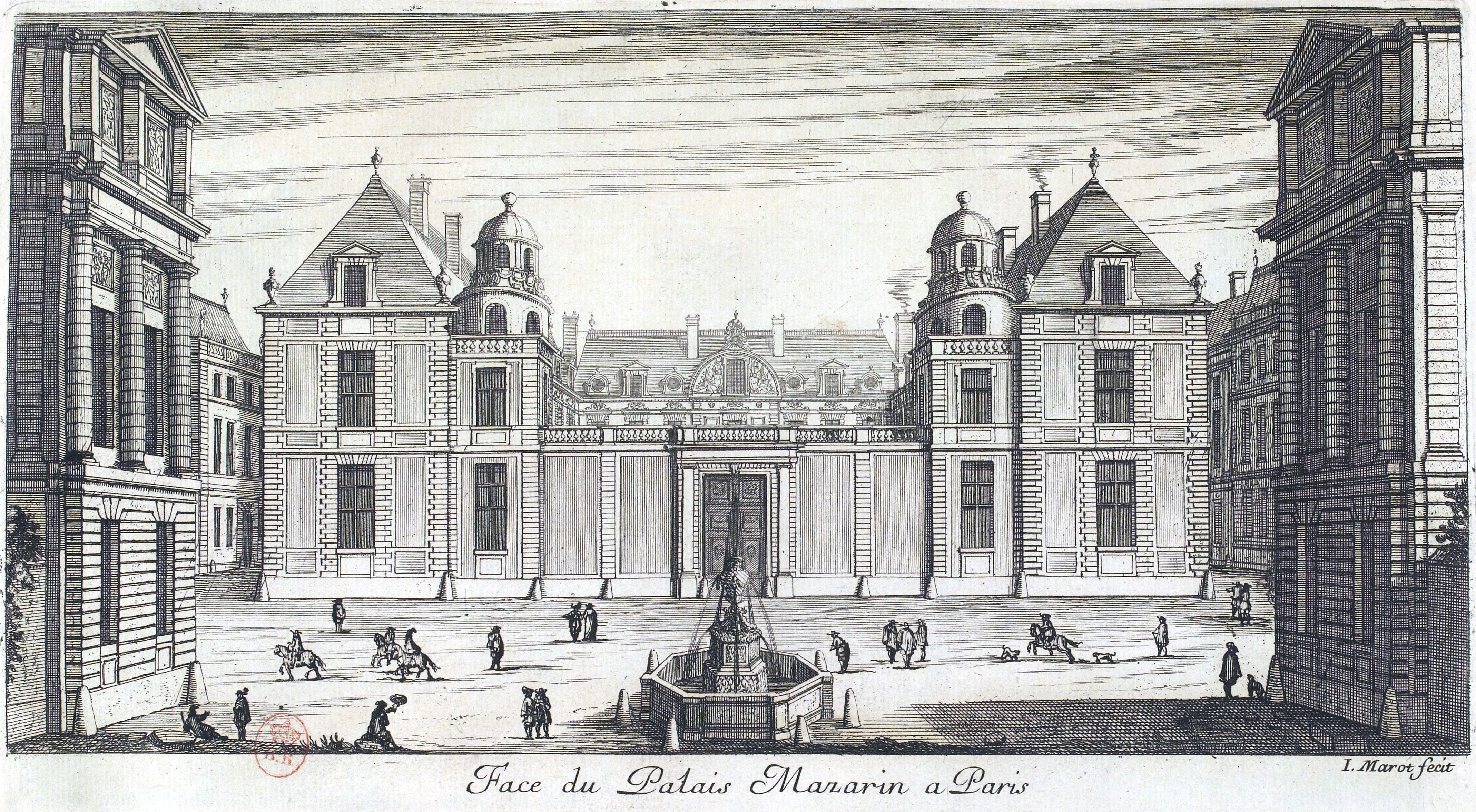 Face du Palais Mazarin à Paris. Plate from Jean Marot's L'Architecture française